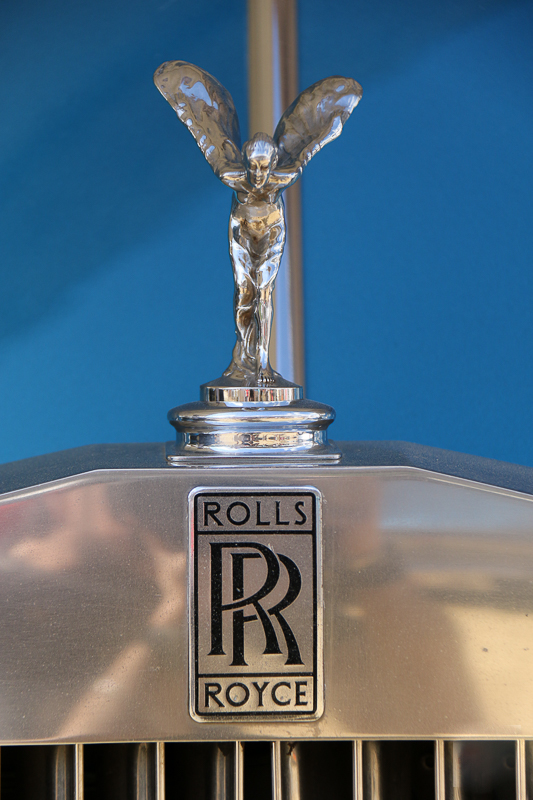 3º Encontro de Carros Antigos de Águas de Lindóia - SP